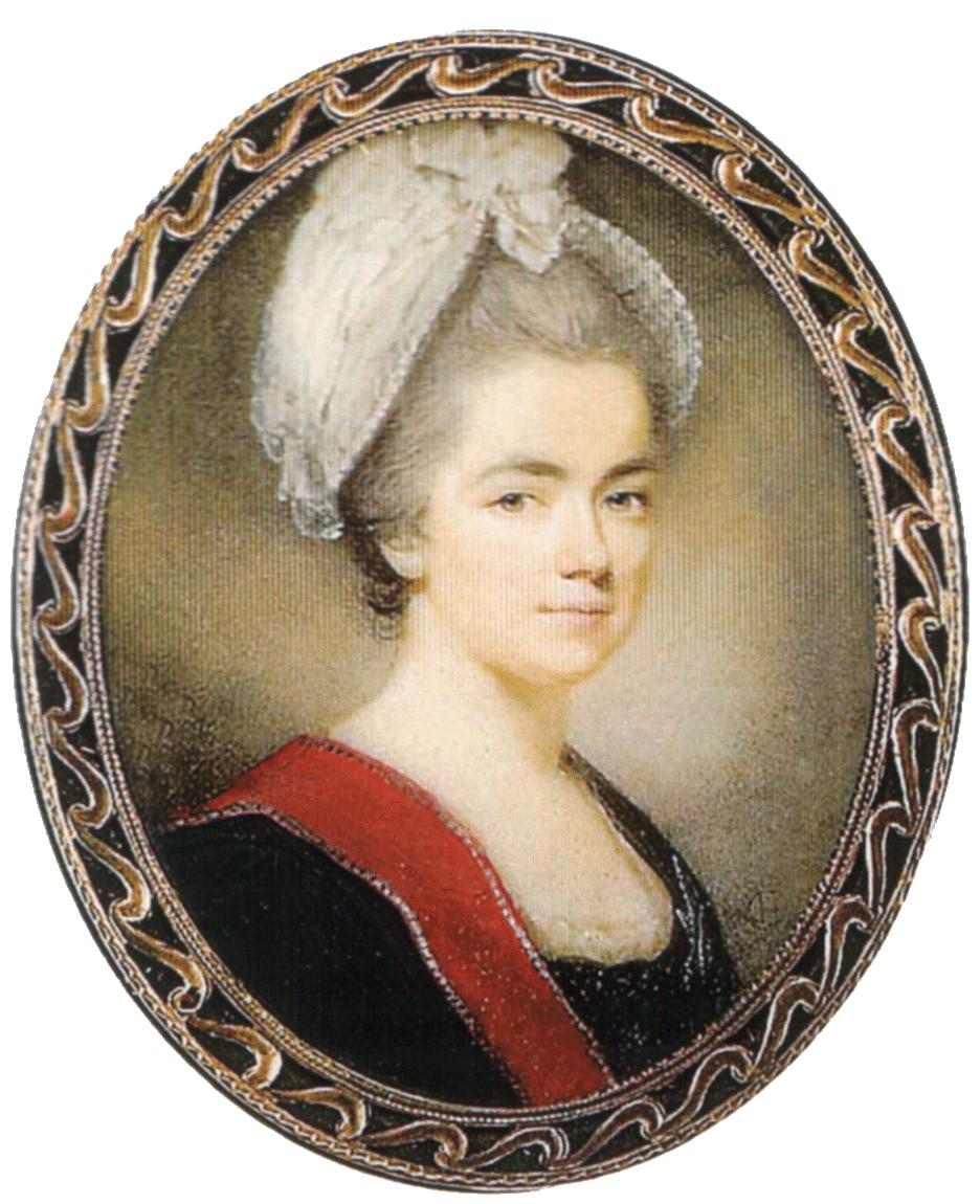 Portrait of Yekaterina Vorontsova-Dashkova (1743/44-1810)